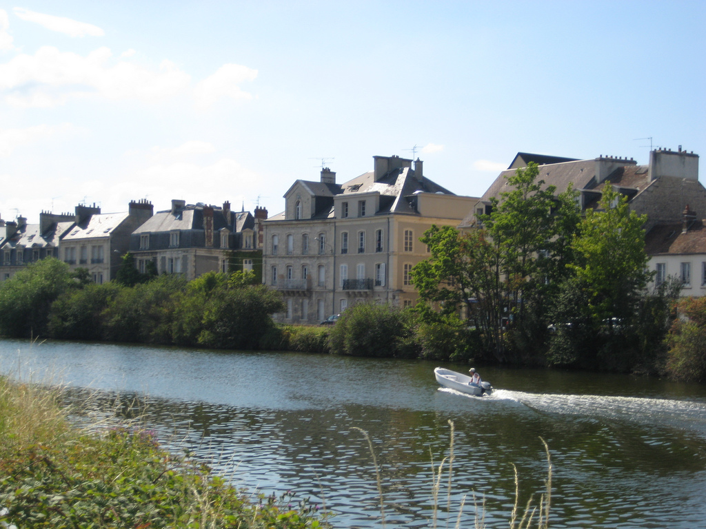 Le Canal de Caen à la Mer depuis la Presqu'île portuaire de Caen